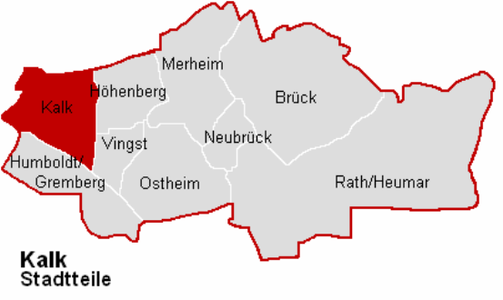 Lagekarte Kalk im Stadtbezirk Köln-Kalk